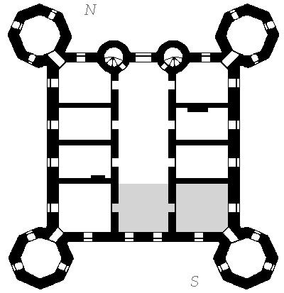 Description=Grundriss Schloss Glücksburg, obere Geschosse Source=self-made Date=01.2008 Author= PodracerHH